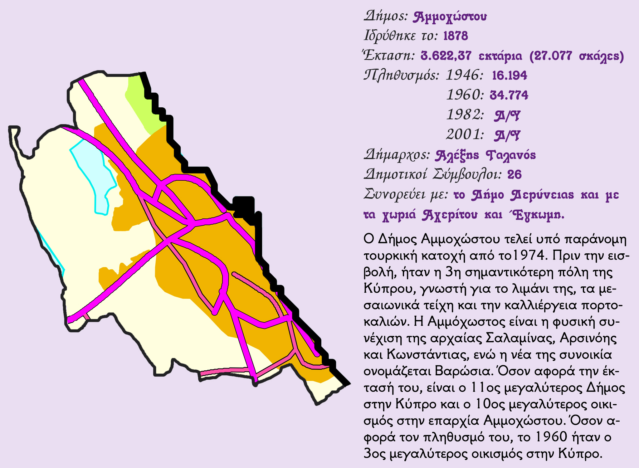 Συνοπτική παρουσίαση της Αμμοχώστου